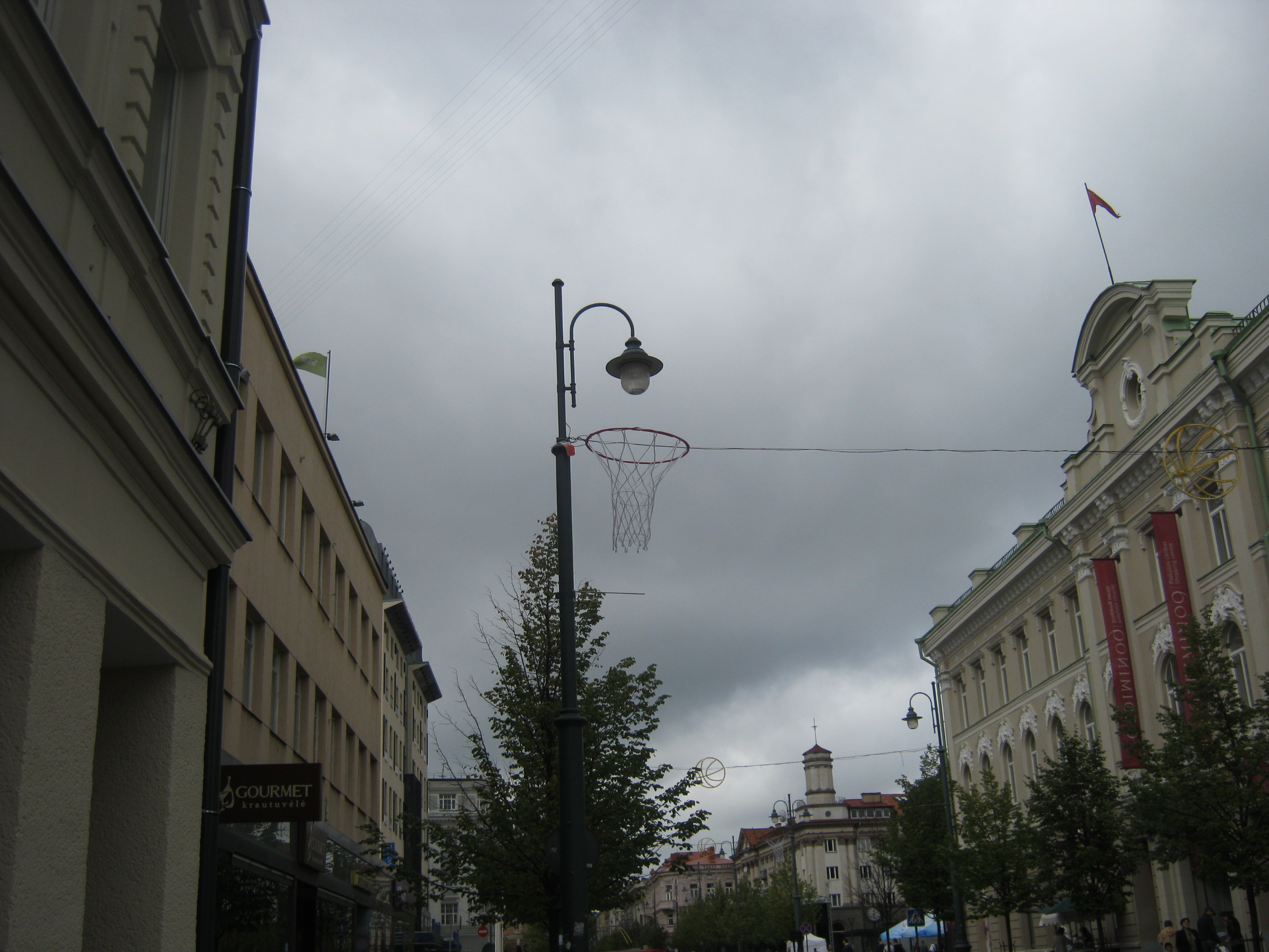 Eurobasket 2011